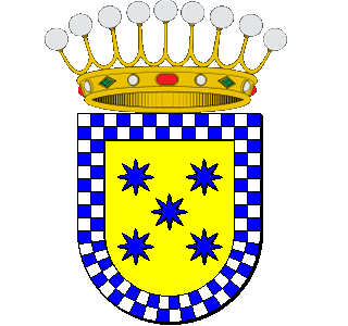 Escudo de los Condes de Mora, también usado antiguamente como escudo de la localidad toledana de Mora. Las armas son las de los rojas timbradas por la corona condal.